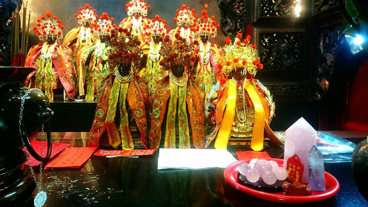 信眾在七娘媽座前供奉粉晶等吉祥物，祈求七娘媽加持桃花運